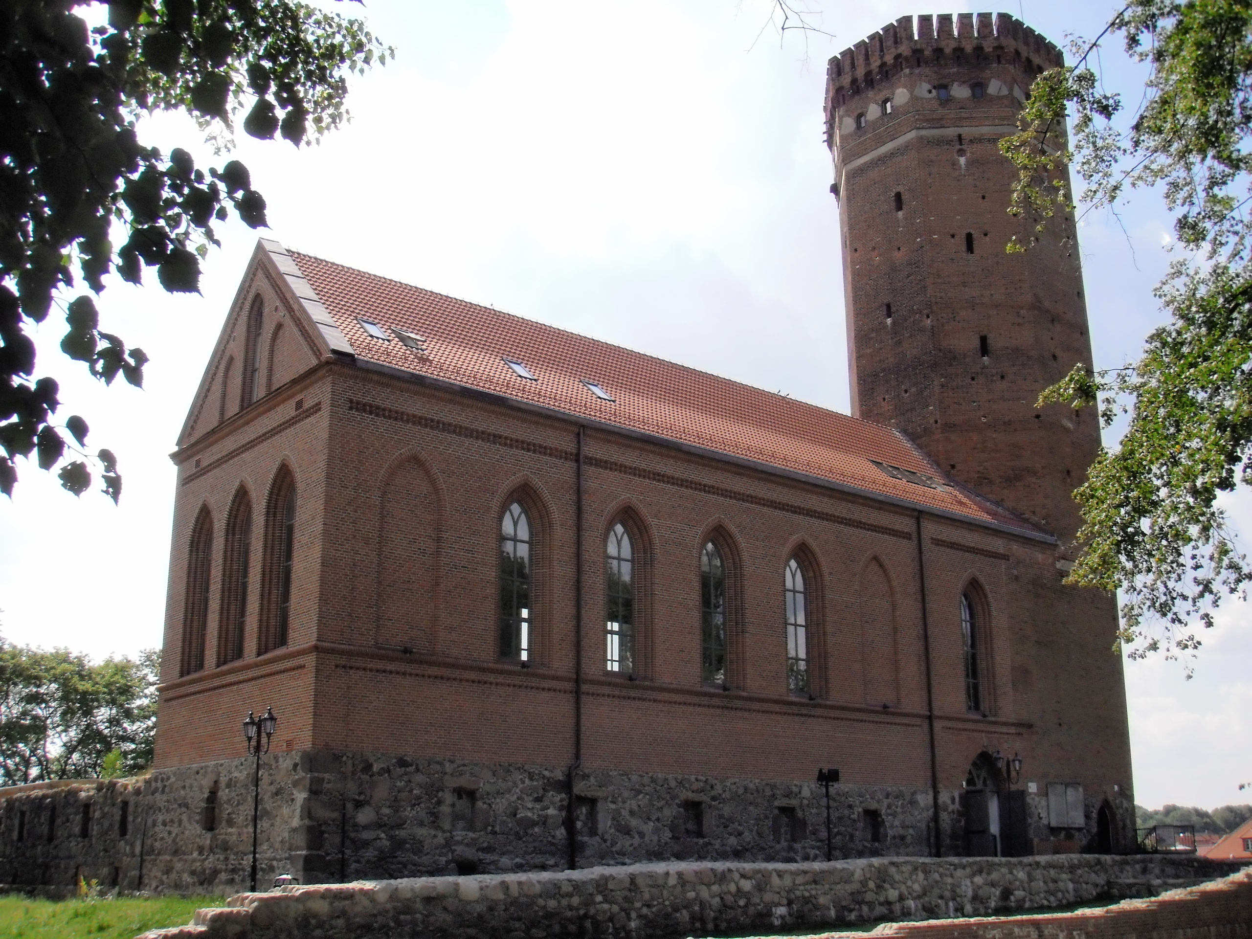 Człuchów, zamek, 1400, 1828